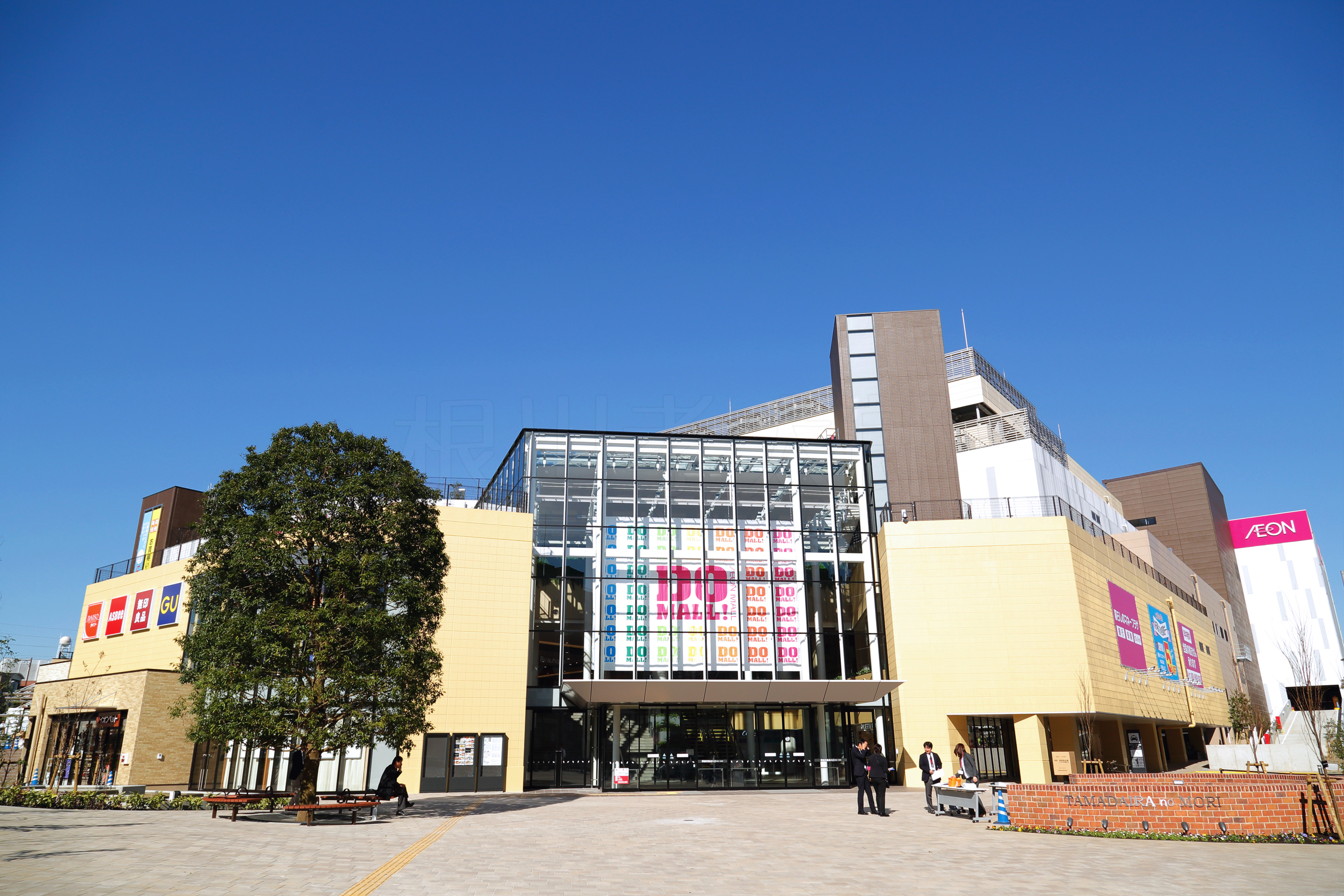 オープン直前のja:イオンモール多摩平の森昼間画像。